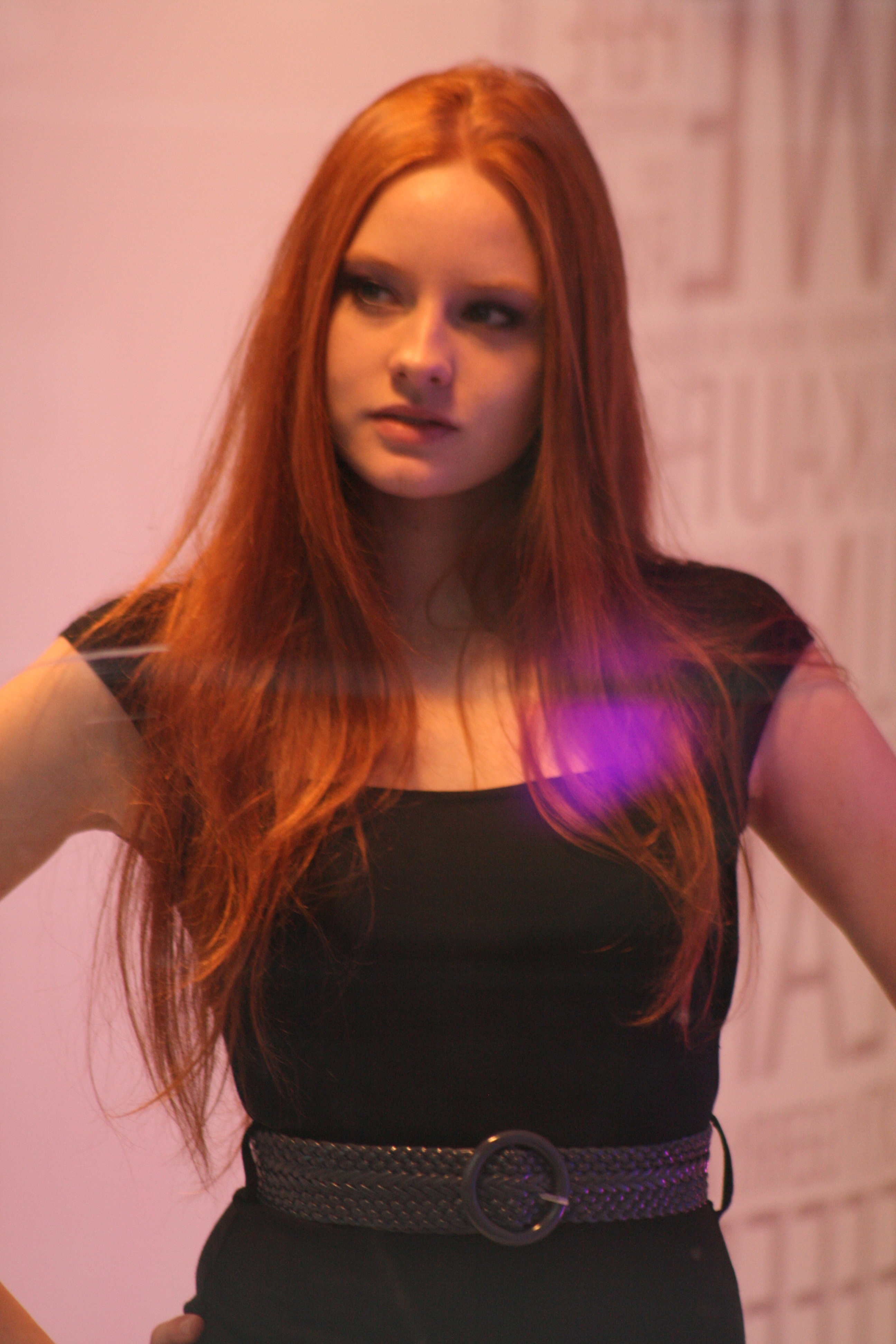 Barbara Meier beim Modegipfel 2007 im CentrO Oberhausen